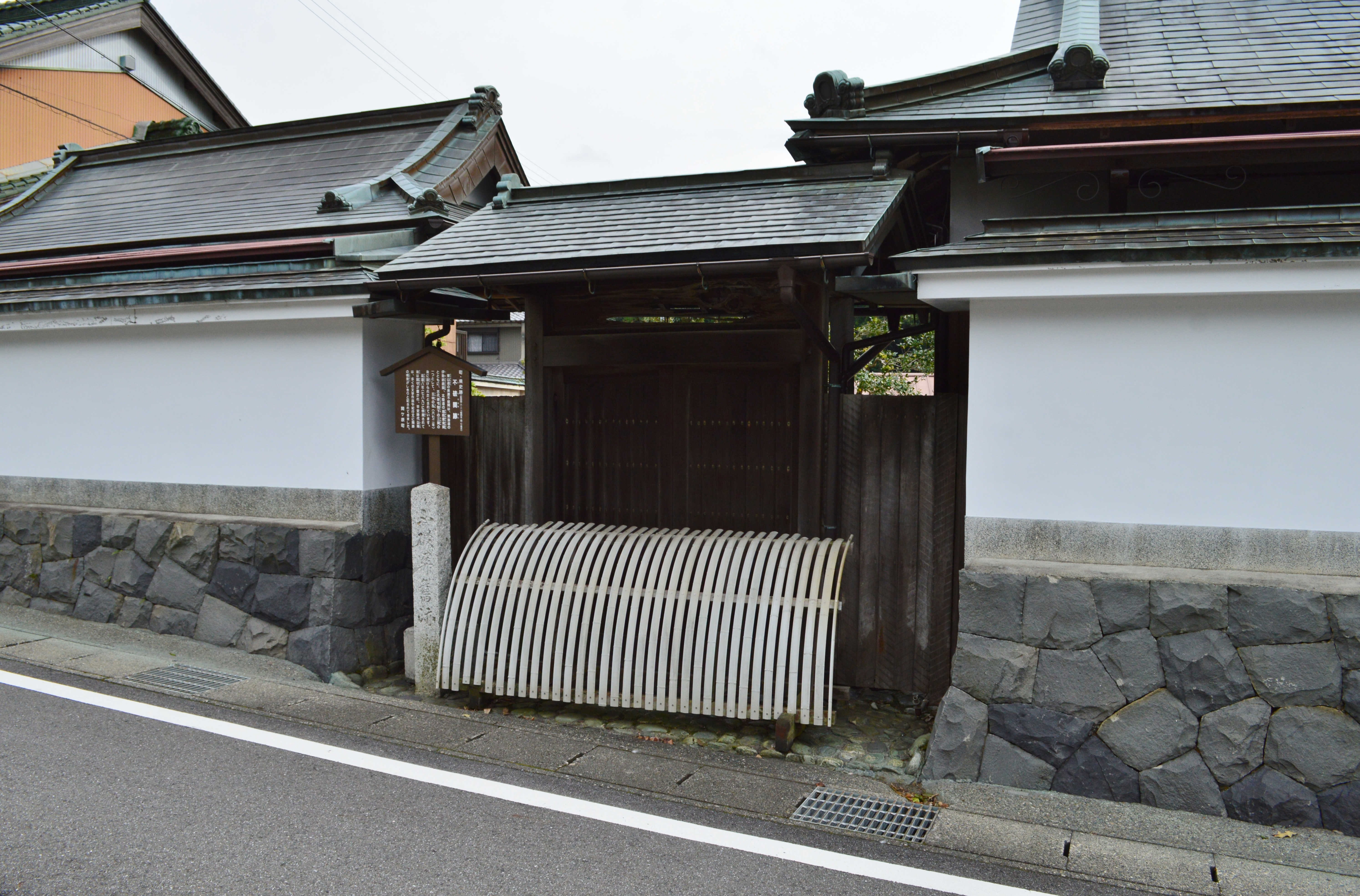 不破関跡 石碑